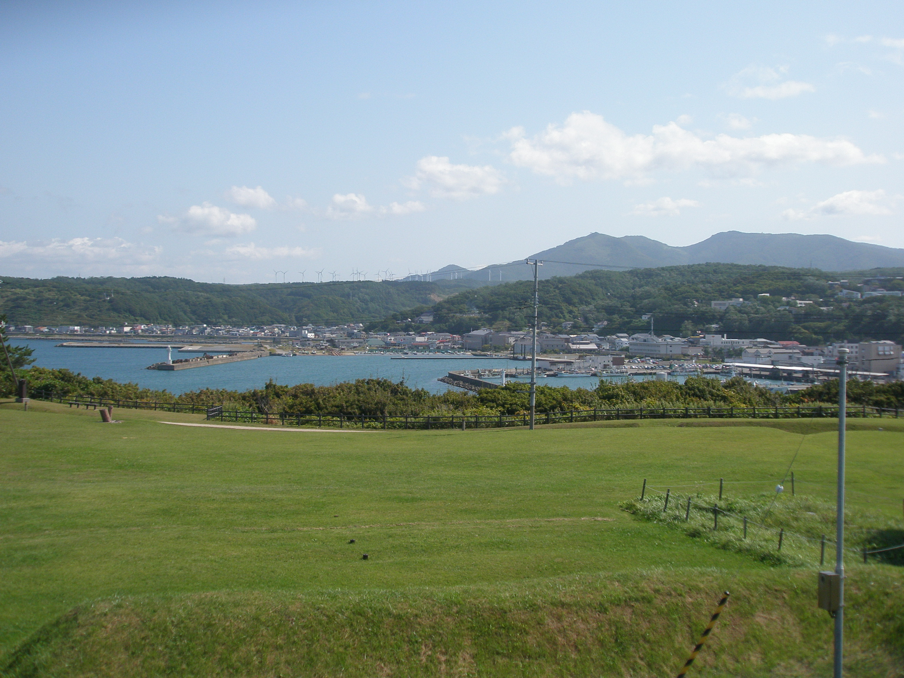 鴎島灯台・展望台から江差港を望む